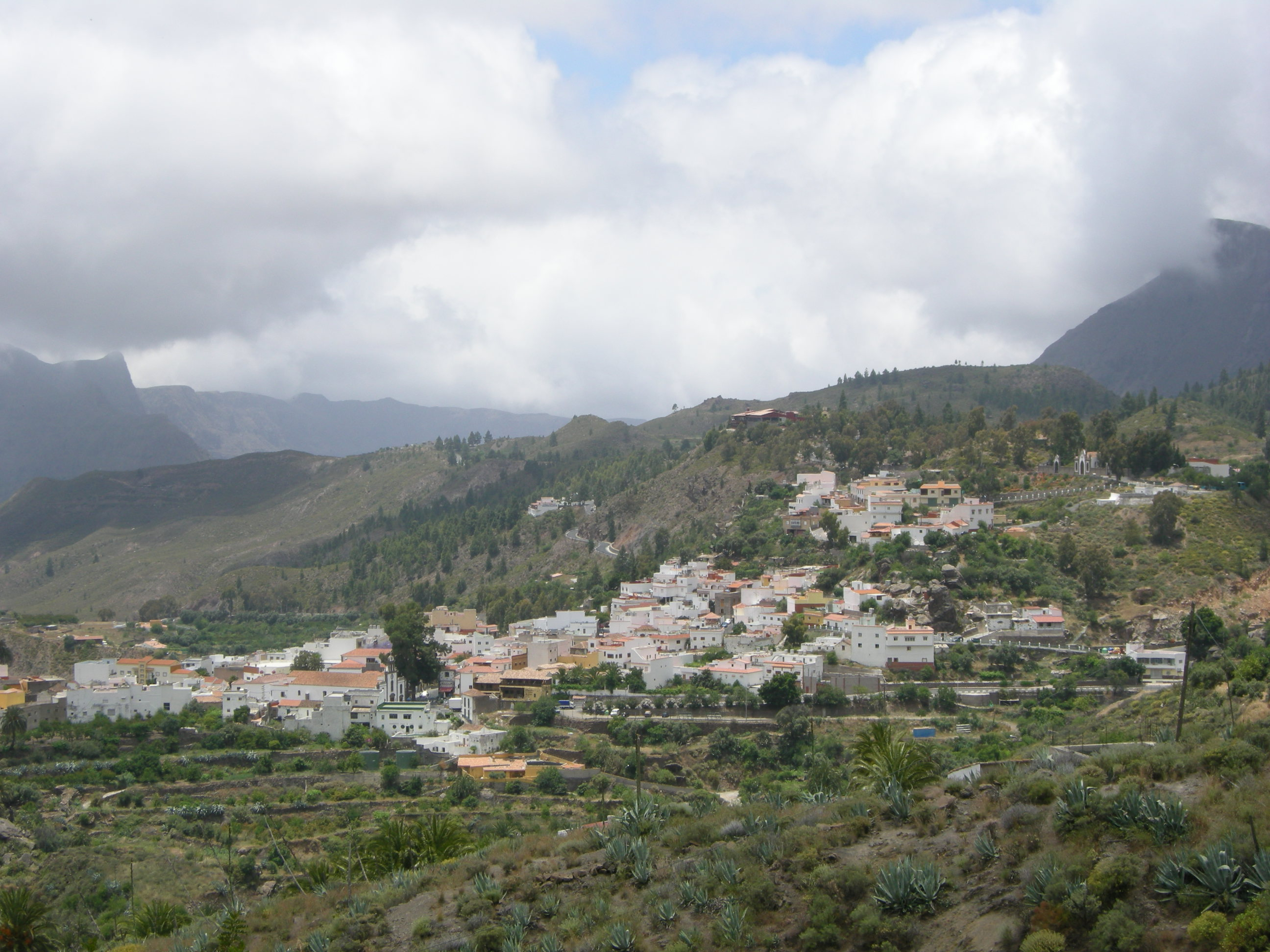 San bartolomé de Tirajana